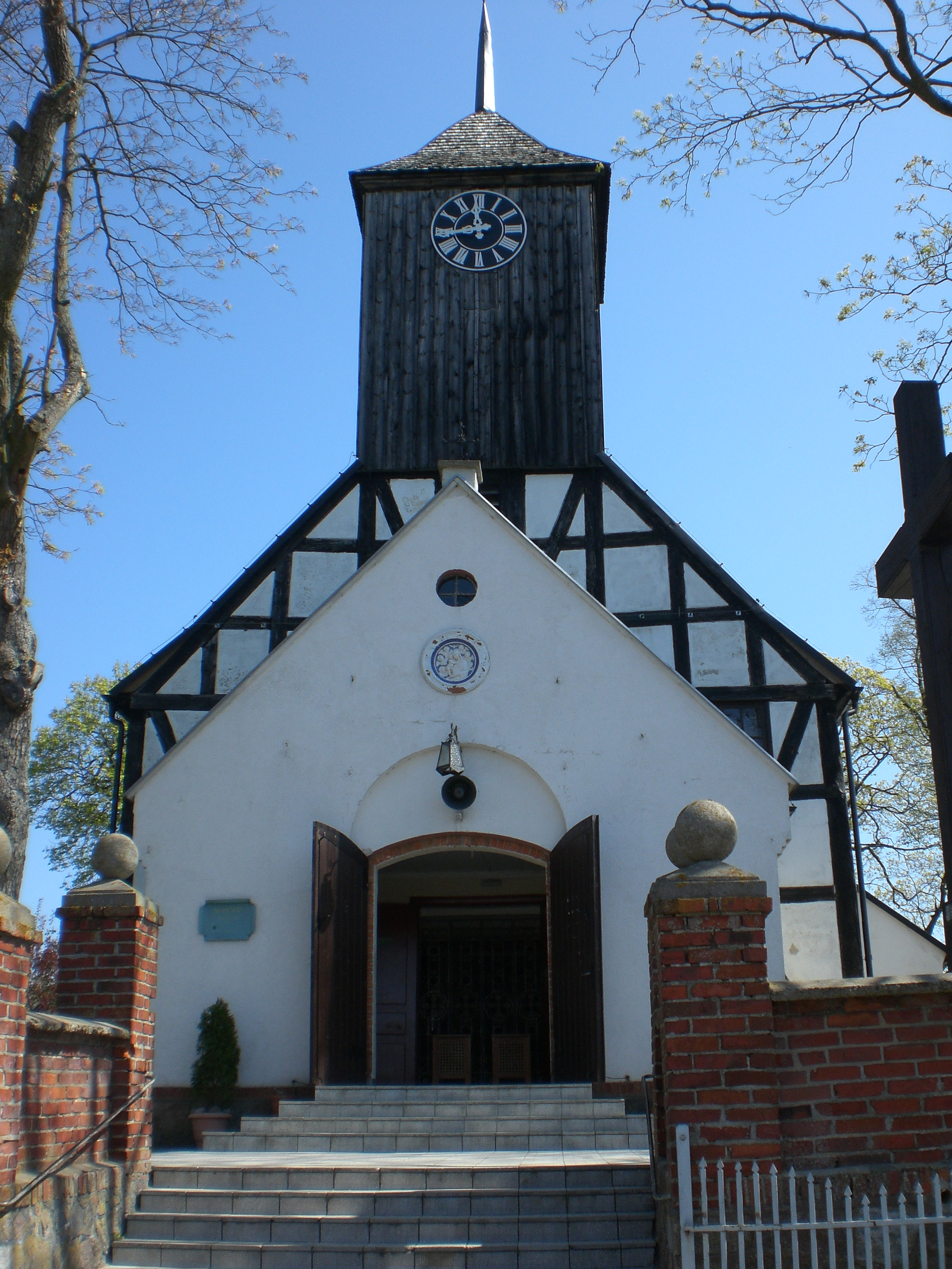 Sianowo - kościół pw. Narodzenia NMP z 1816 (Sanktuarium Matki Boskiej Sianowskiej)